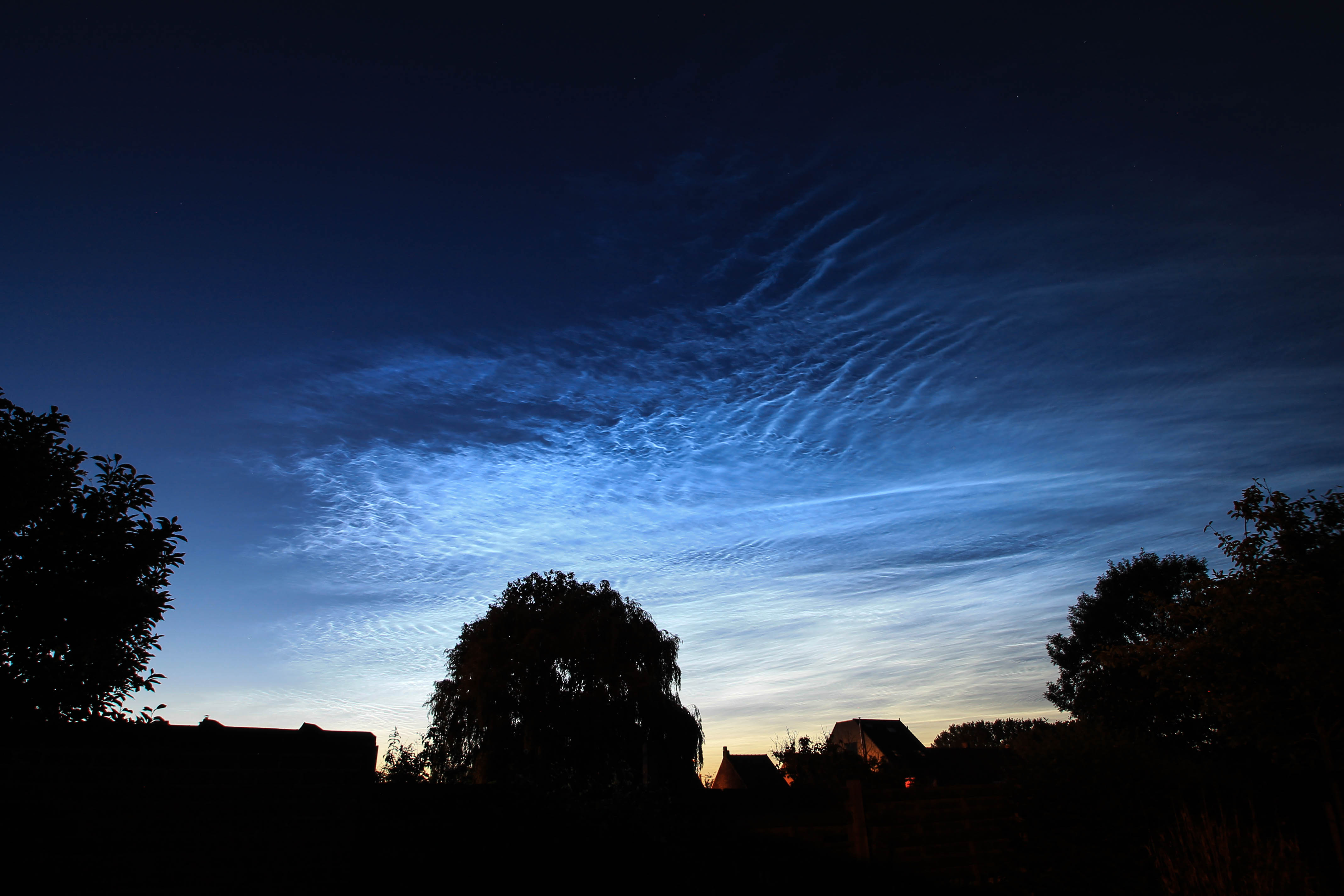 Tijdens de avond/nacht van vrijdag 21 op zaterdag 22 juni 2019 was er een uitzonderlijke display van lichtende nachtwolken te zien.